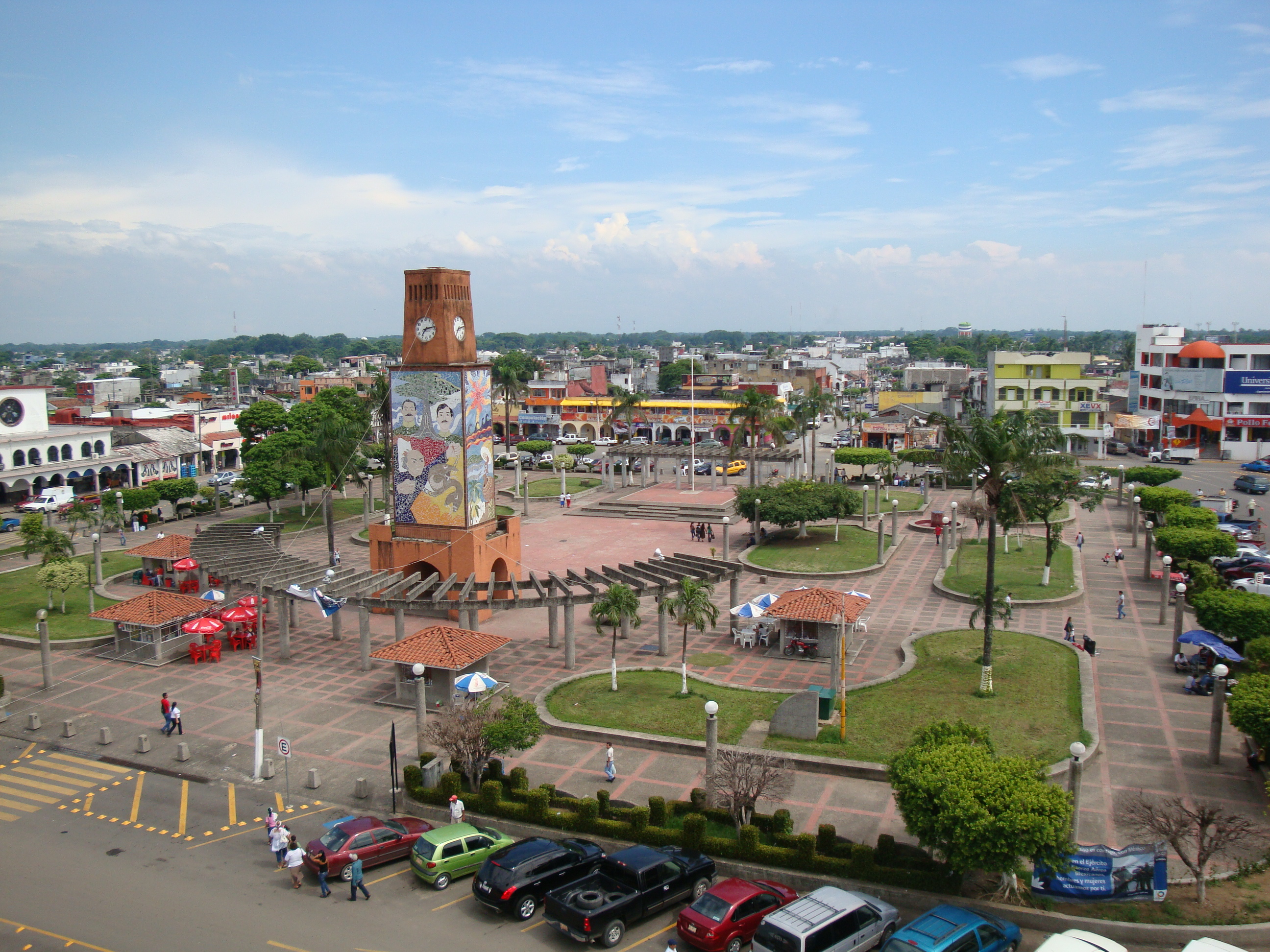 Parque Independencia, de la ciudad de Heroica Cárdenas, estado de Tabasco, México